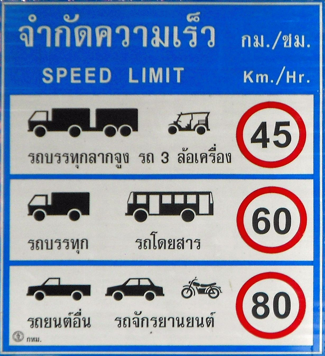 Schild Geschwindigkeitsbegrenzung in Bangkok